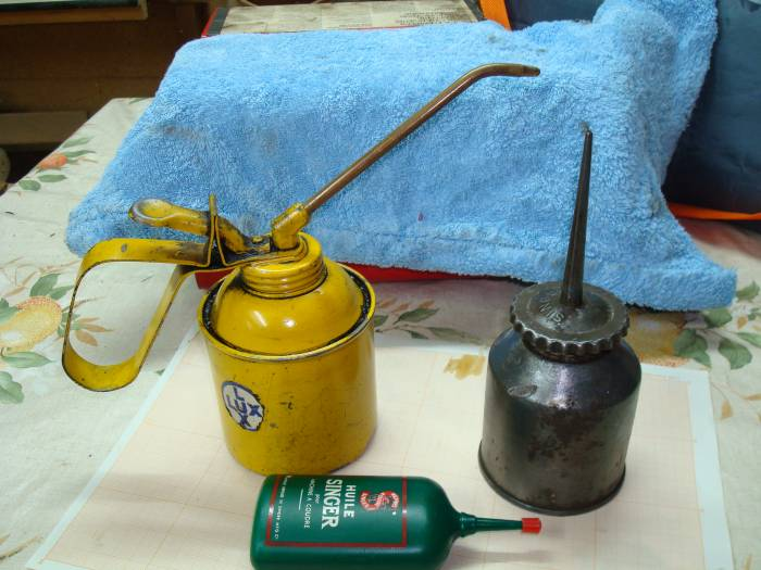 Photos de burettes d'huile